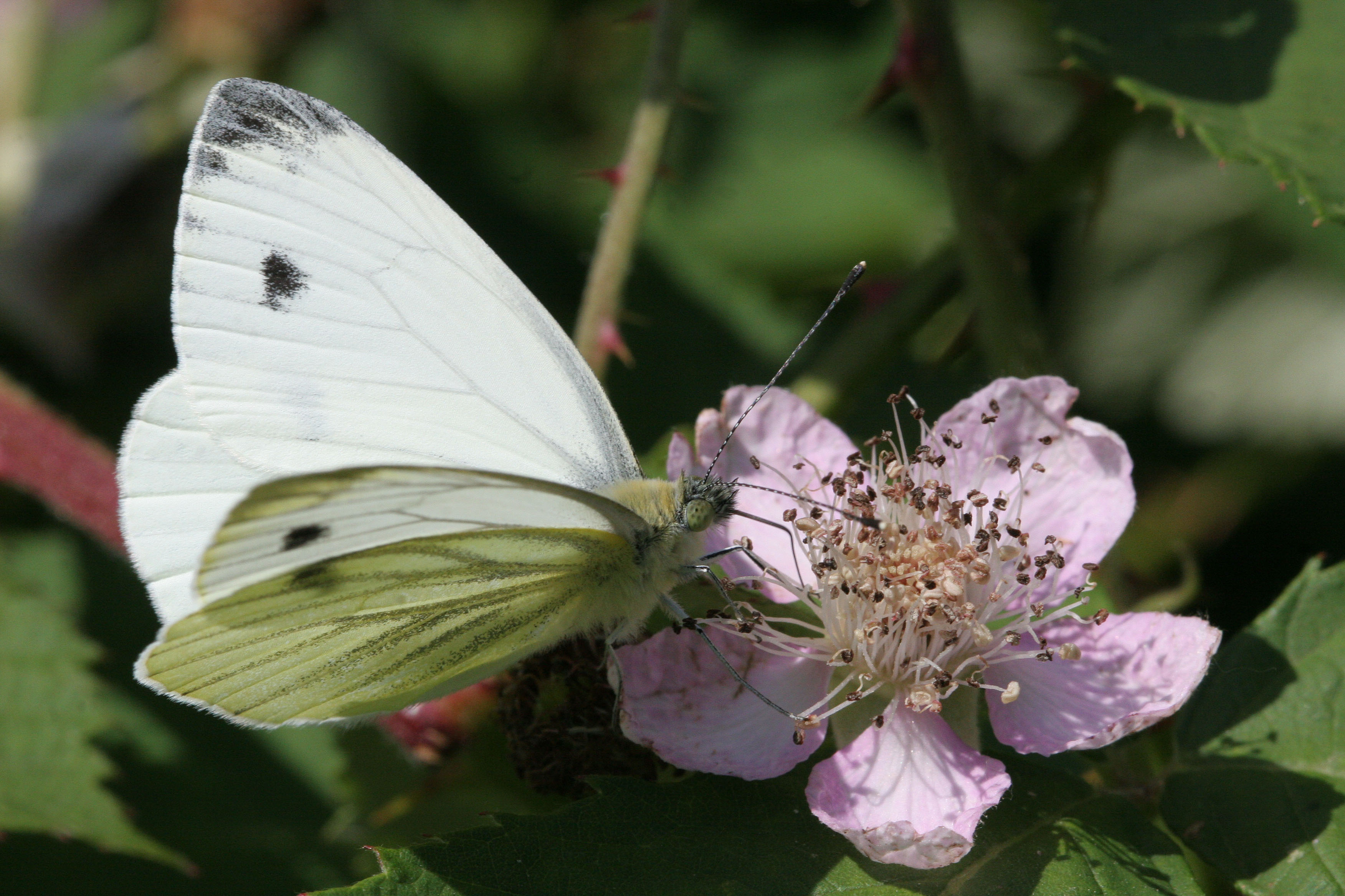 Großer Kohlweißling (Pieris brassicae) Pieris napi , in Bensheim. Correction: Pieris napi, Green Veined White